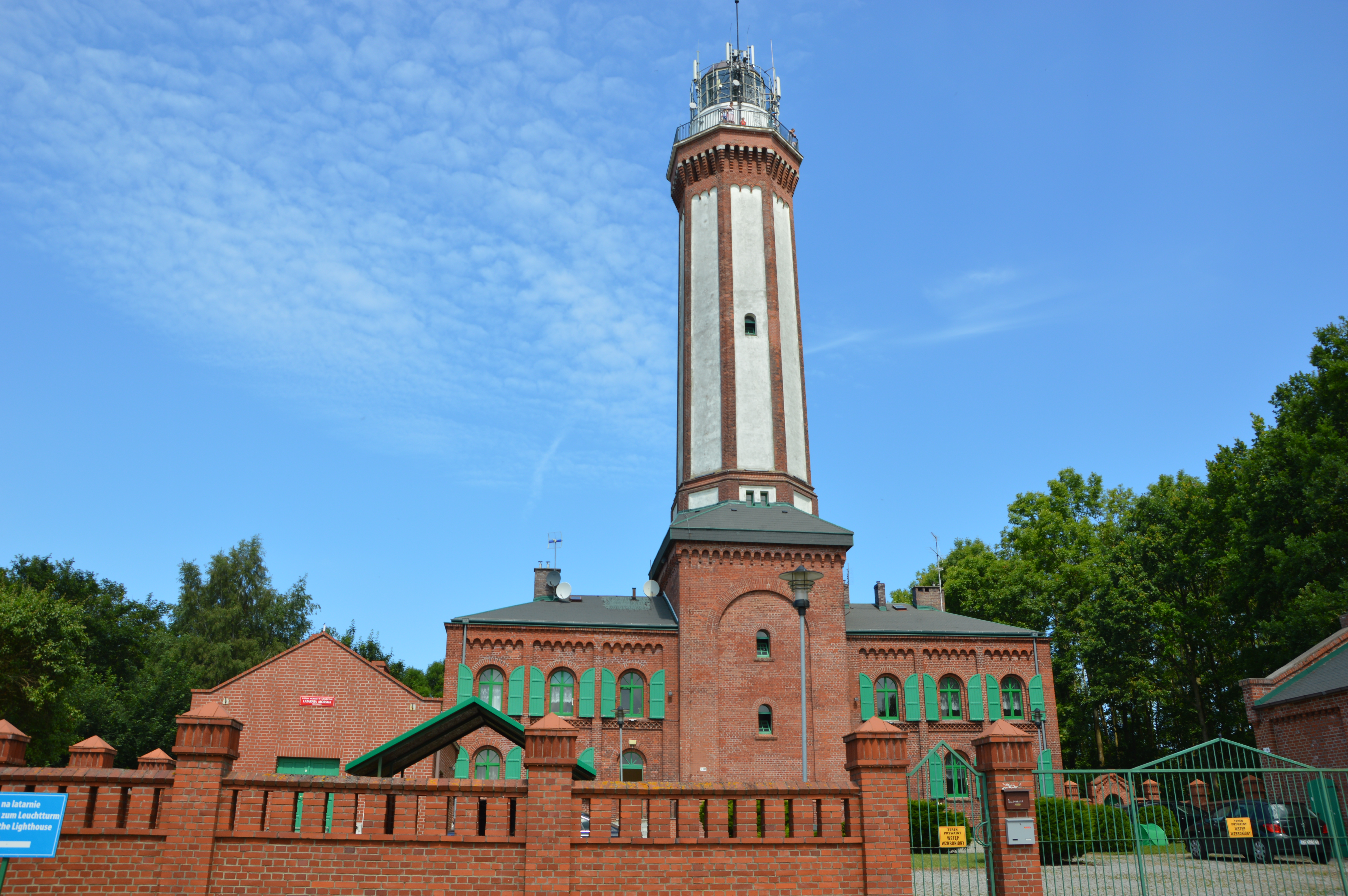 NIECHORZE LATARNIIA MORSKA